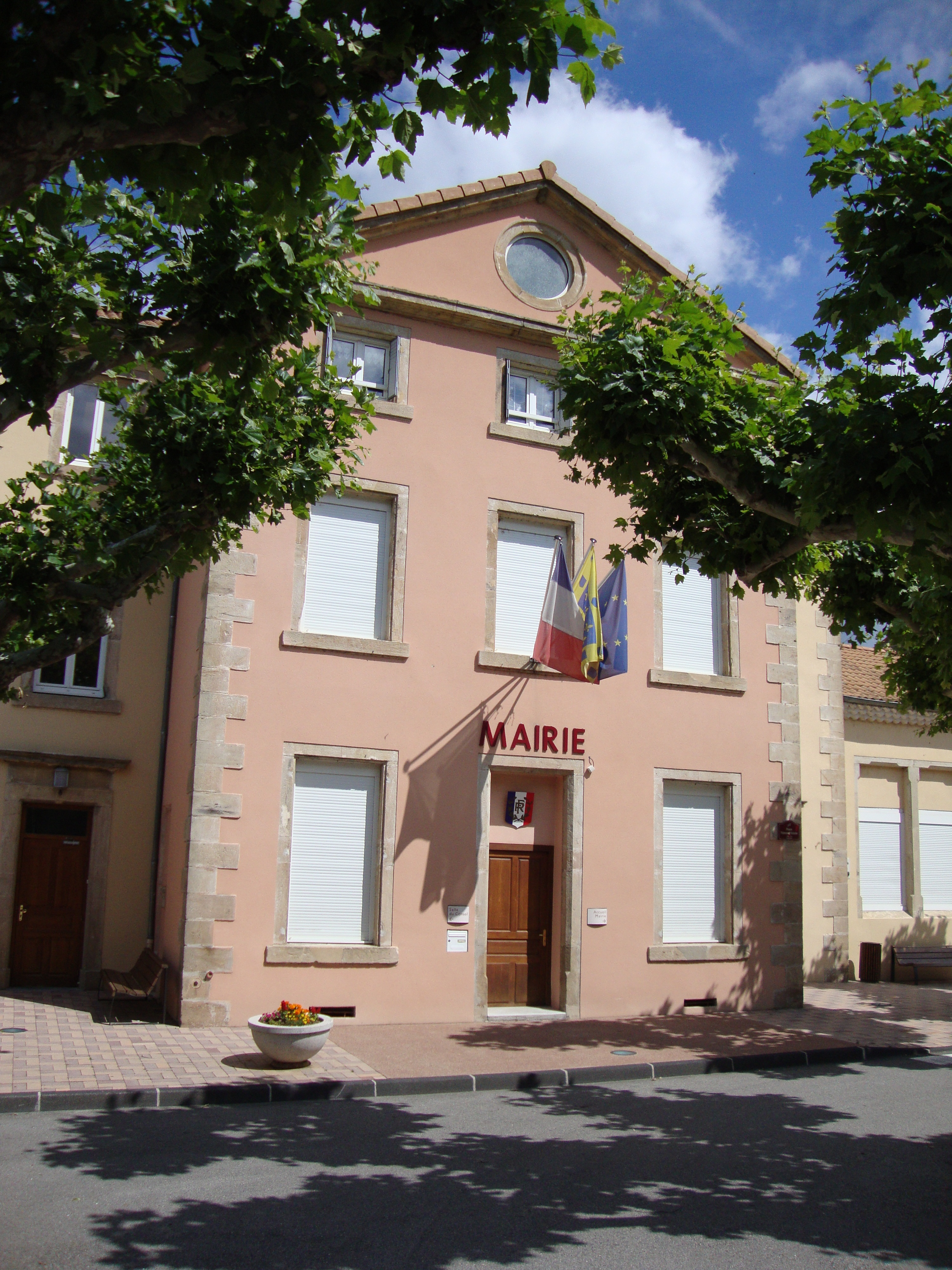 St.Julien-en-Saint-Alban (Ardèche, Fr) mairie